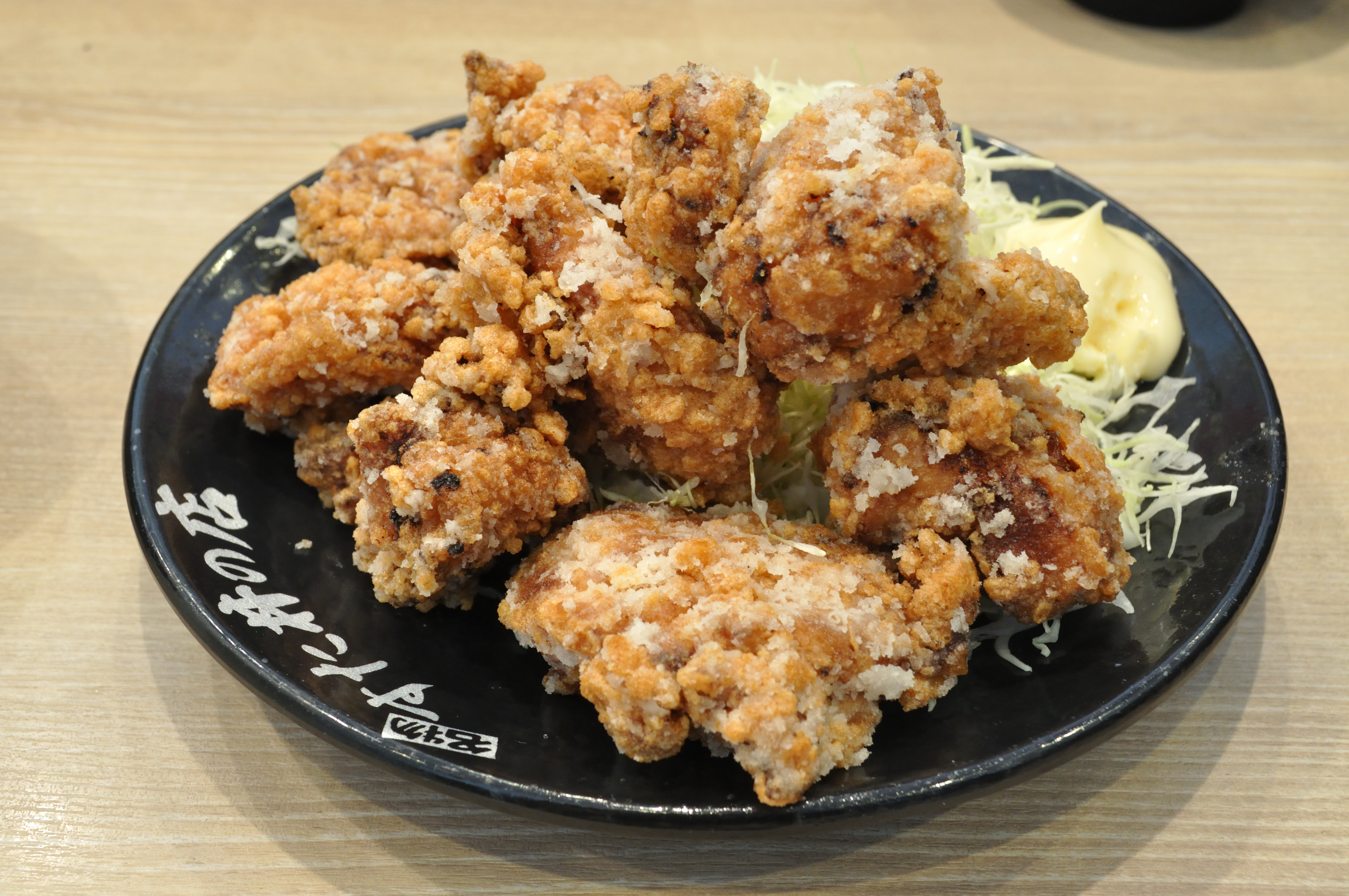 伝説のすた丼屋のすたみな唐揚げ定食鬼盛り Nikon D5000